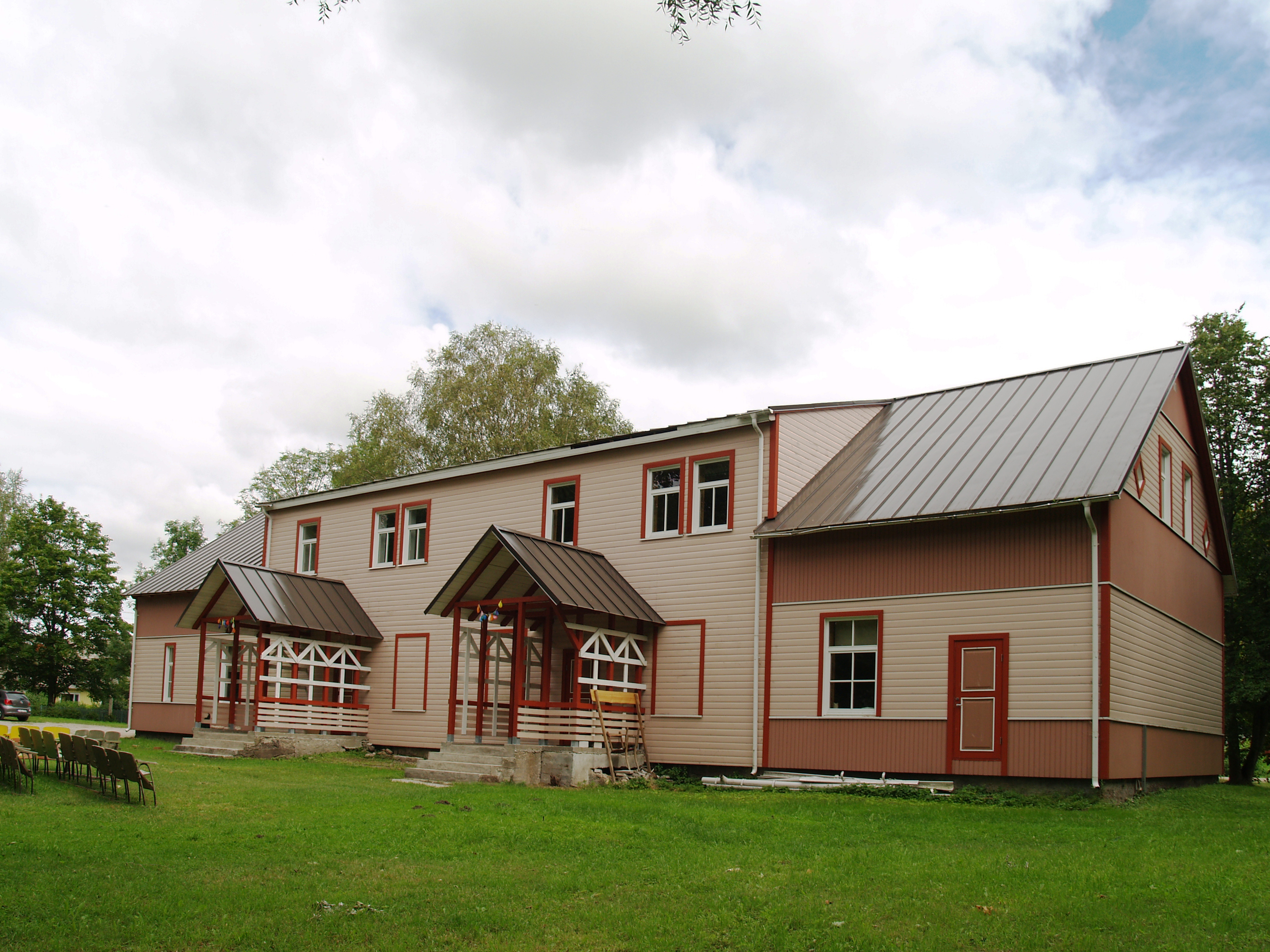 Häädemeeste Seltsimaja